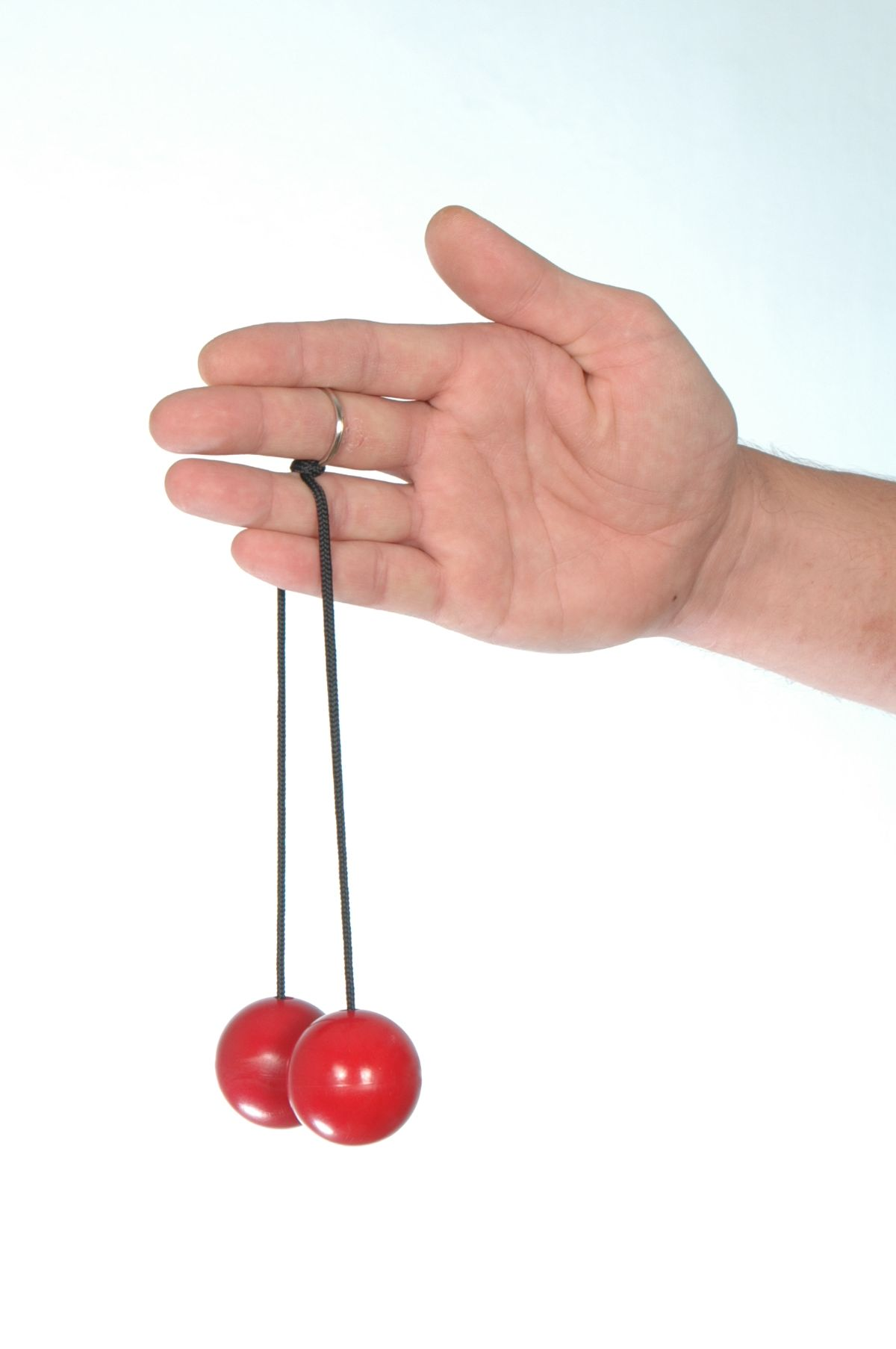 Způsob držení kliklaku mezi prsty